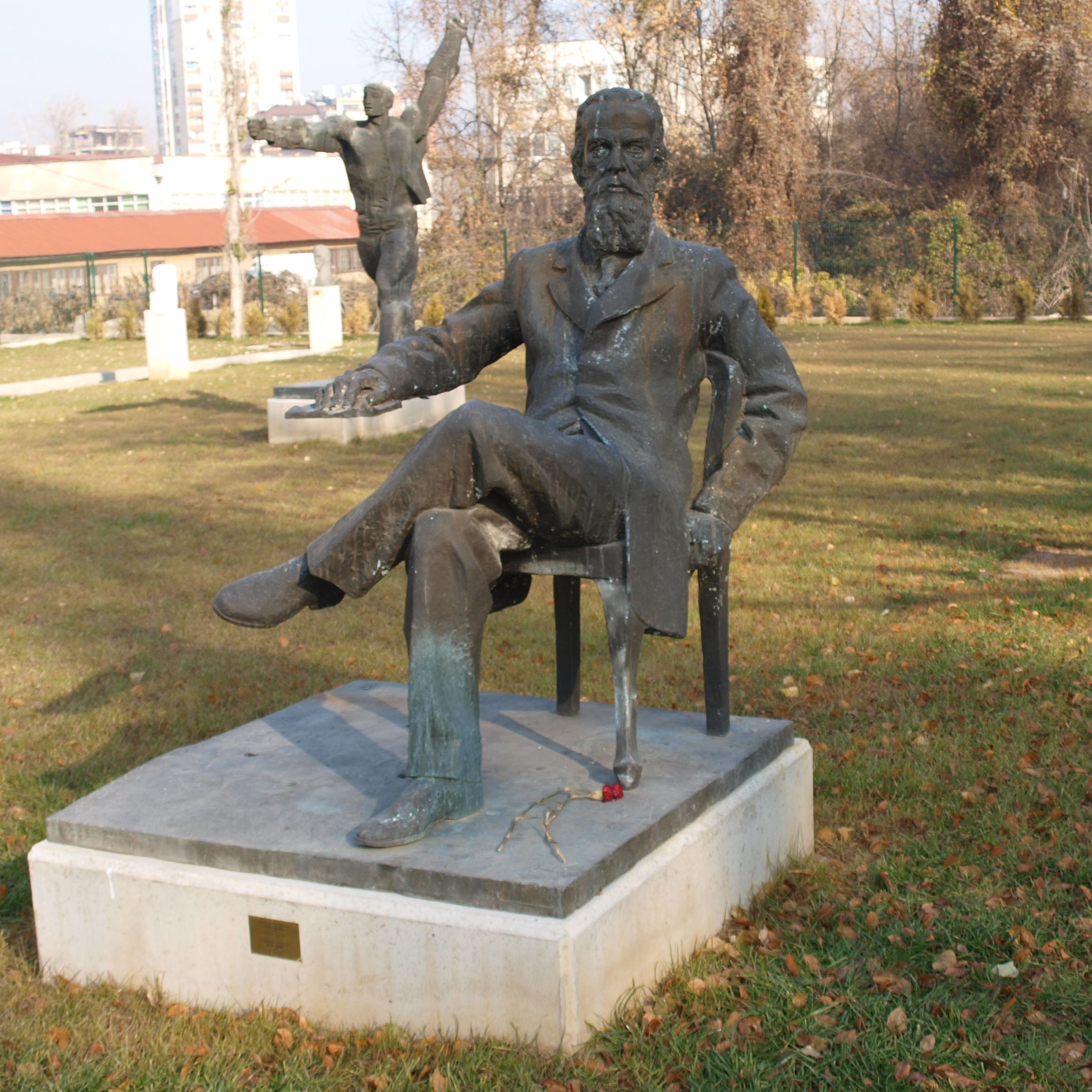 Скулптури в парка на Музея на социалистическото изкуство в София - Димитър Благоев.